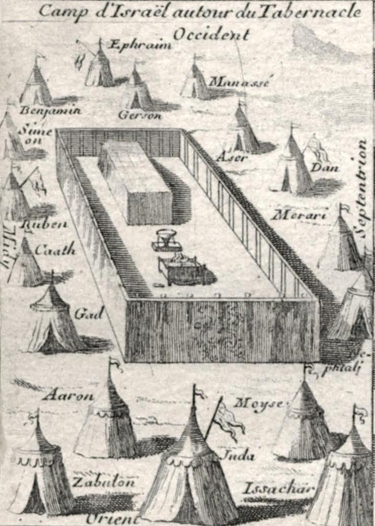 Camp d'Israël autour du tabernaclè Occident. From: Carte du voïage des Israëlites dans le désert depuis leur sortie de l'Egipte jusqu'au passage du Jourdain, dressé par l'auteur du commentaire de l'Exode et / exécutée par Liébaux, géografe.